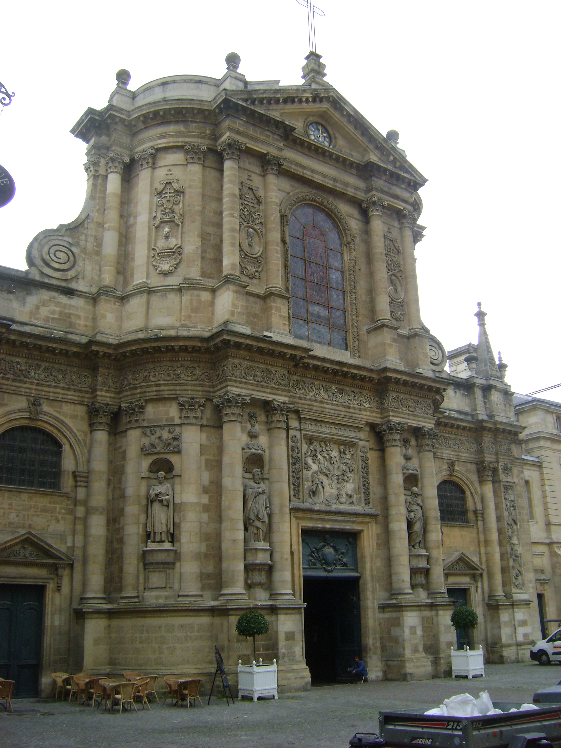 Eglise Notre-Dame de Borceaux. .